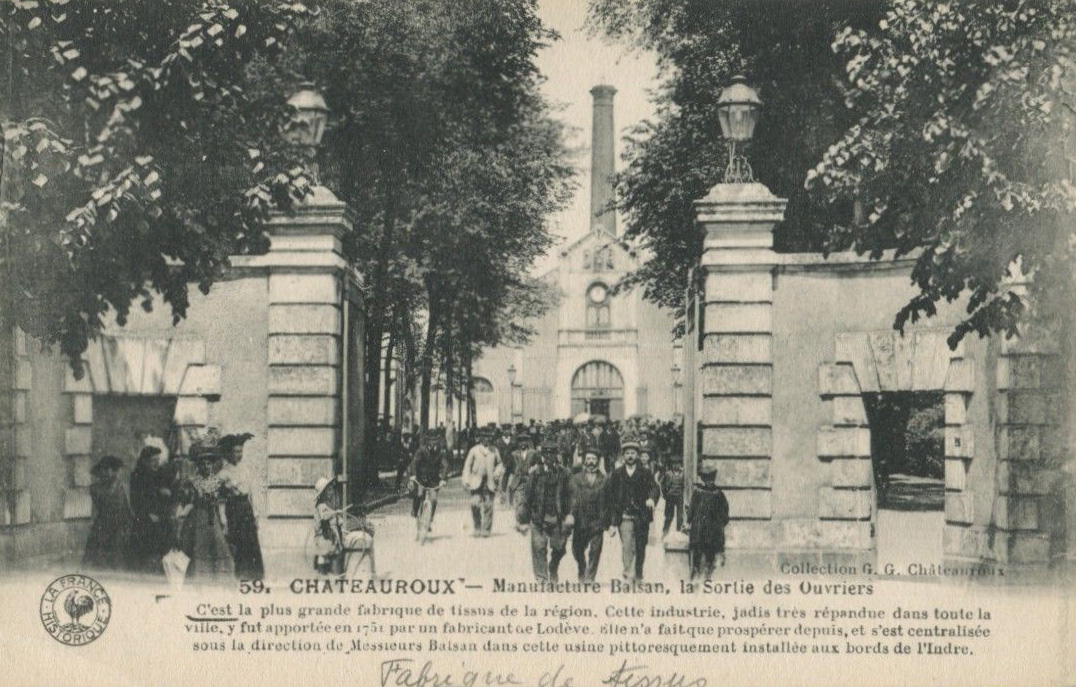 Manufacture Balsan en 1780 à Chateauroux